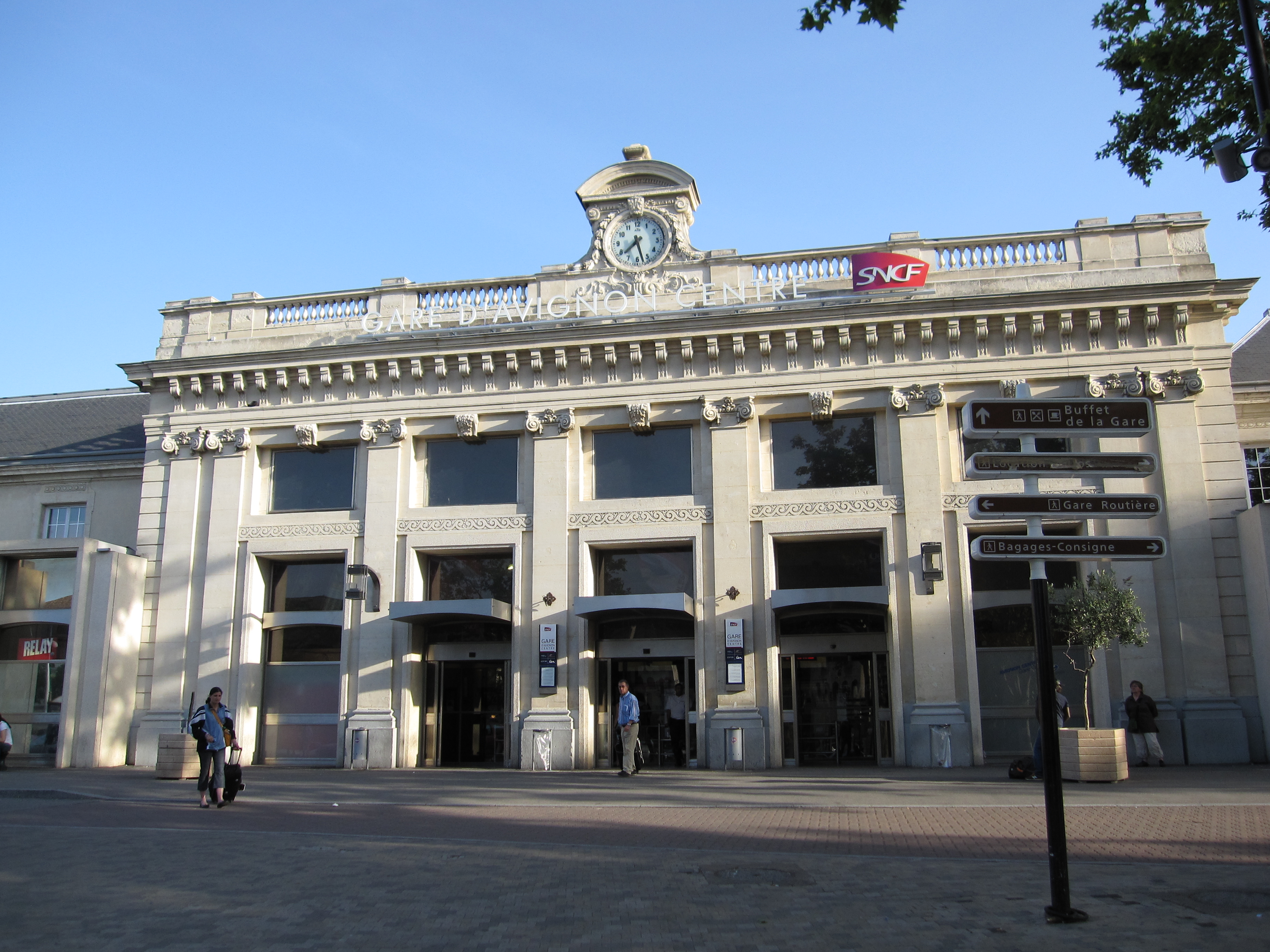 Façade de la gare d'Avignon centre ville